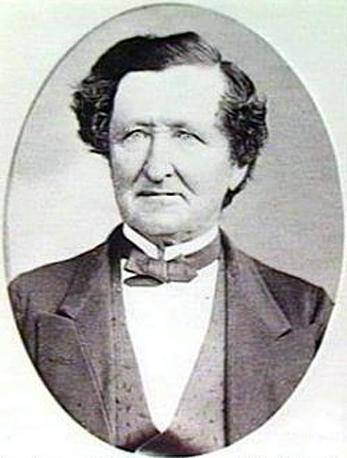 (Moritz) Richard Schomburgk, 1811 - 1891, Direktor des Botanischen Gartens in Adelaide